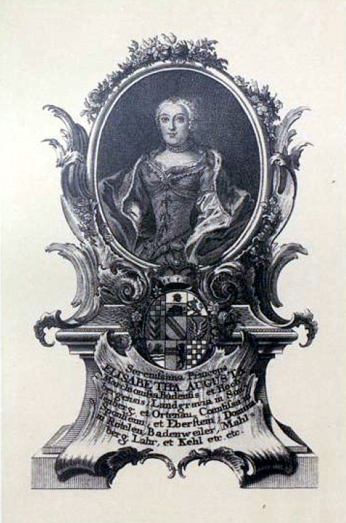 Prizessin Elisabeth Augusta von Baden-Baden/Althann